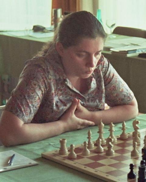 Jelena Abramowna Fatalibekowa in Bad Kissingen 1982